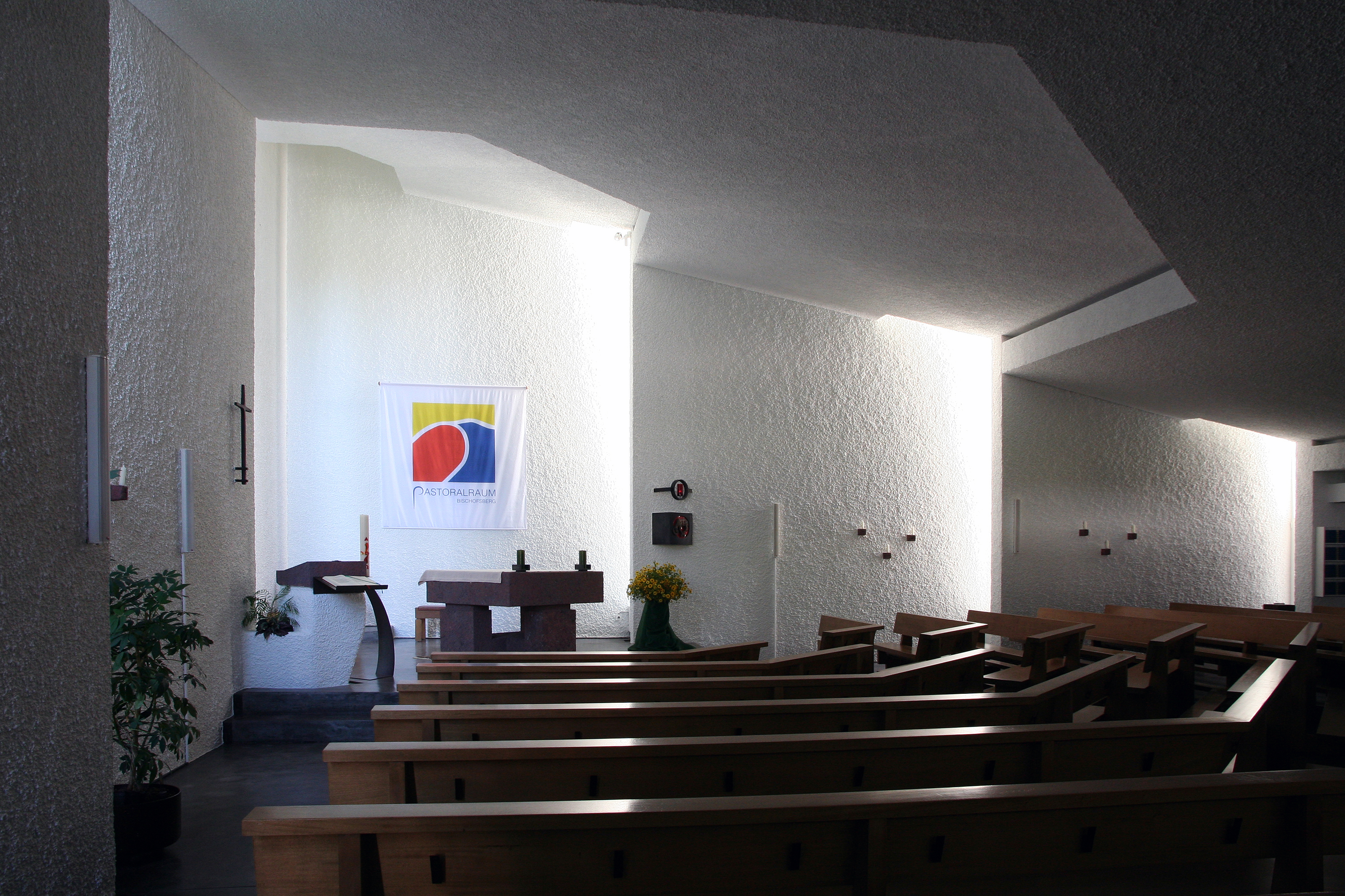 röm.-kath. Kirche St. Antonius Hauptwil Thurgau